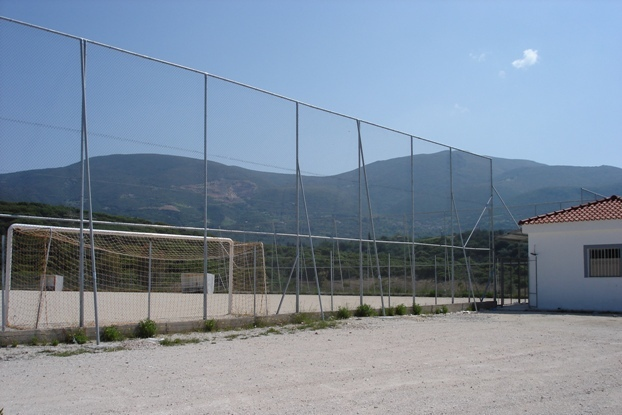 Vasiliko Groud Achaea Greece Γήπεδο Βασιλικού Αχαΐας